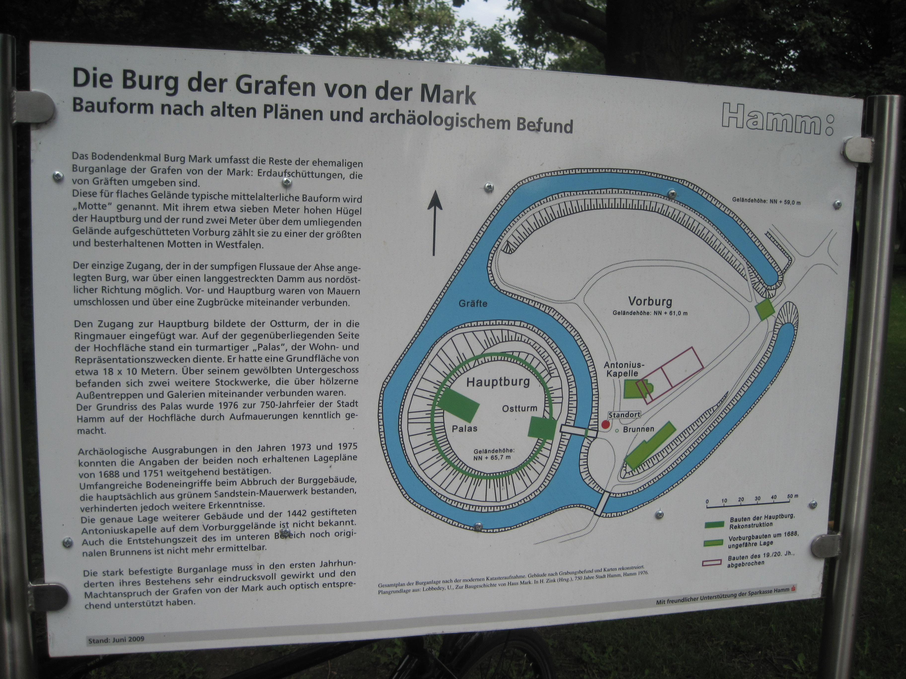 Dieses Foto zeigt eine Informationstafel auf dem Burghügel zur Mark in Hamm.